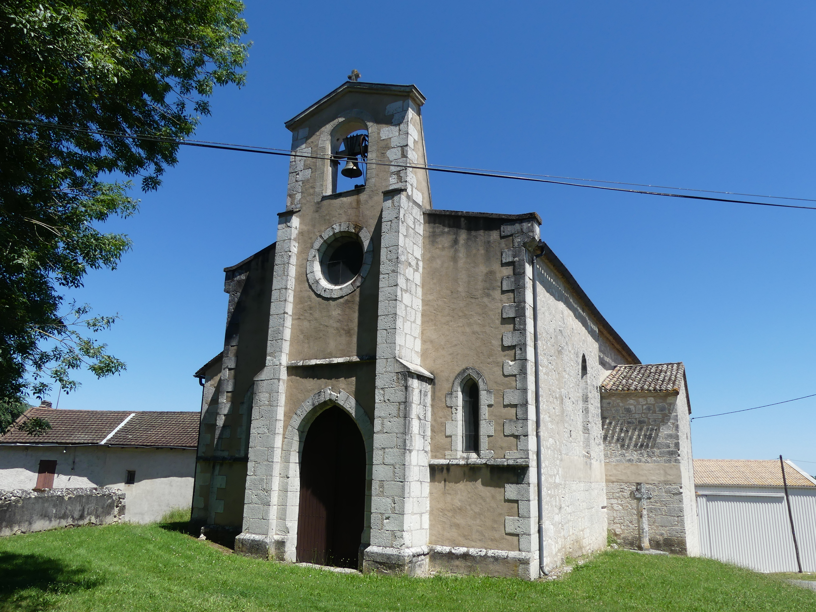 L'église de Saint-Perdoux, Dordogne, France.